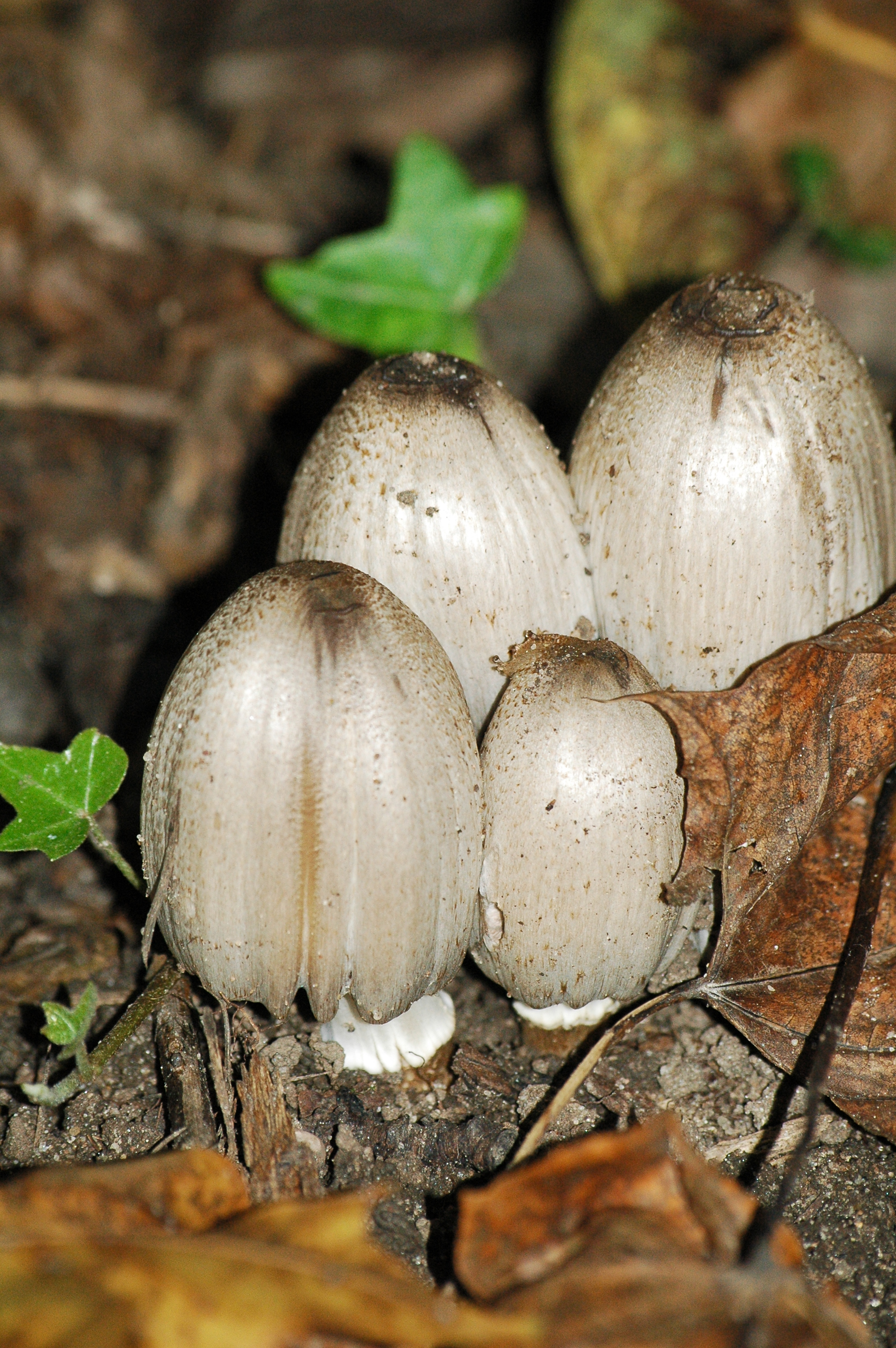 Kleine Gruppe von Coprinus atramentarius